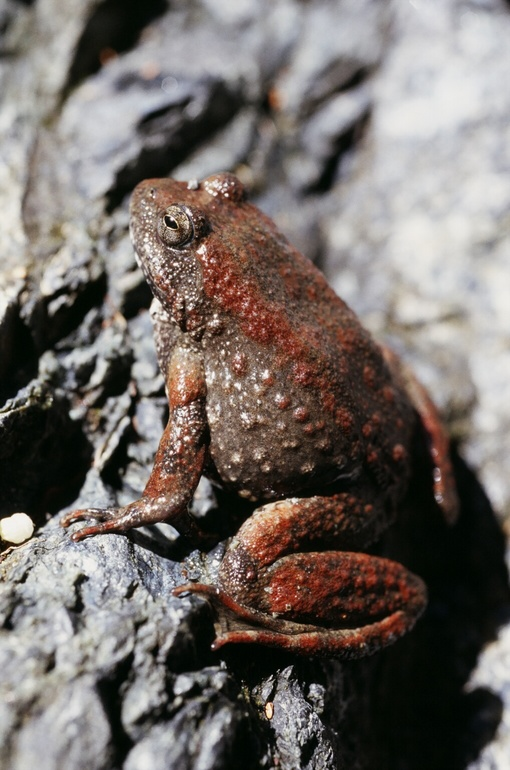 Rana boylii